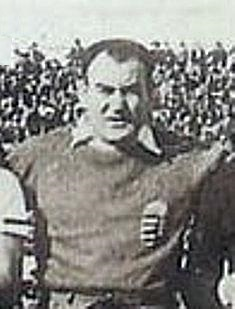 Francisco Platko, entrenador de Colo-Colo en 1941